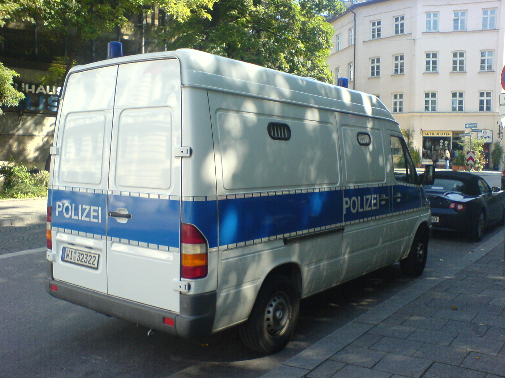 Gefangenenkraftwagen der Hessischen Polizei, Mercedes Benz Sprinter